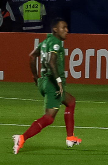 (São Paulo - SP, 14/06/2019) Jogo de Abertura da Copa América Brasil 2019. Foto: Marcos Corrêa/PR